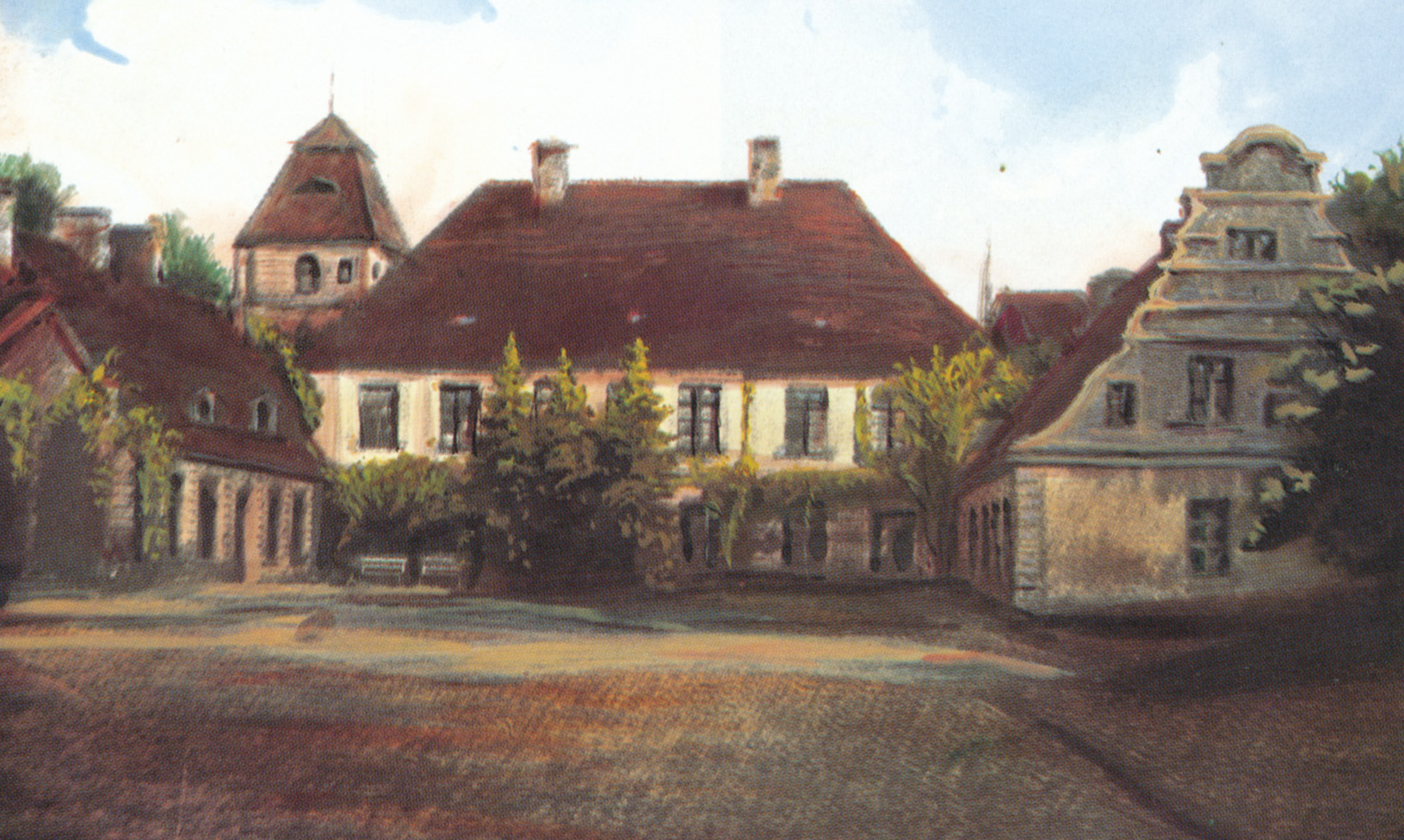 Gutsensemble Wollin, Kreis Stolp (vormals Pommern) Datum: ca. 2. Hälfte des 19. Jahrhunderts Urheber: unbekannter Maler Quelle: Deutsches Familienarchiv, Geschichte des Geschlechts v. Puttkamer, Verlag Degener & Co., 1984, Seite 819